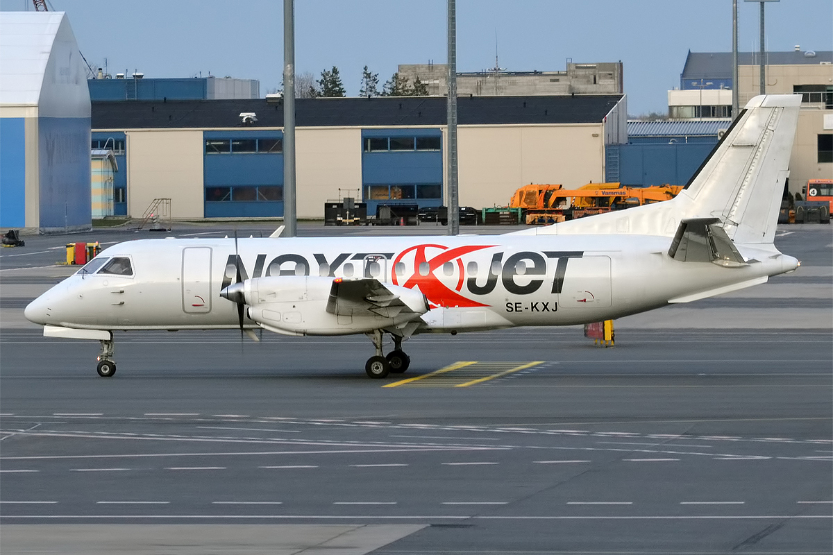 NextJet, SE-KXJ, Saab 340B